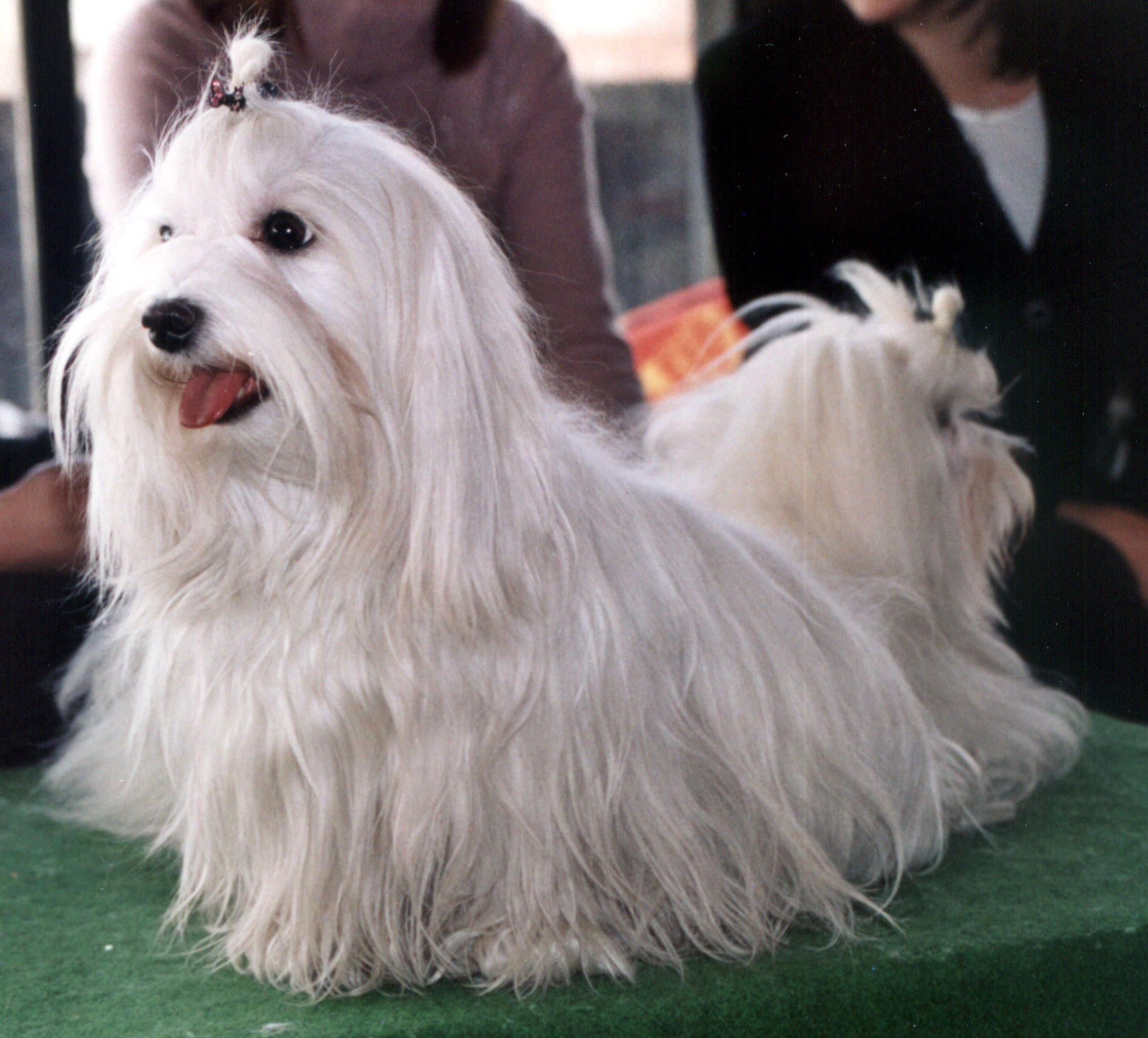 Maltańczyk